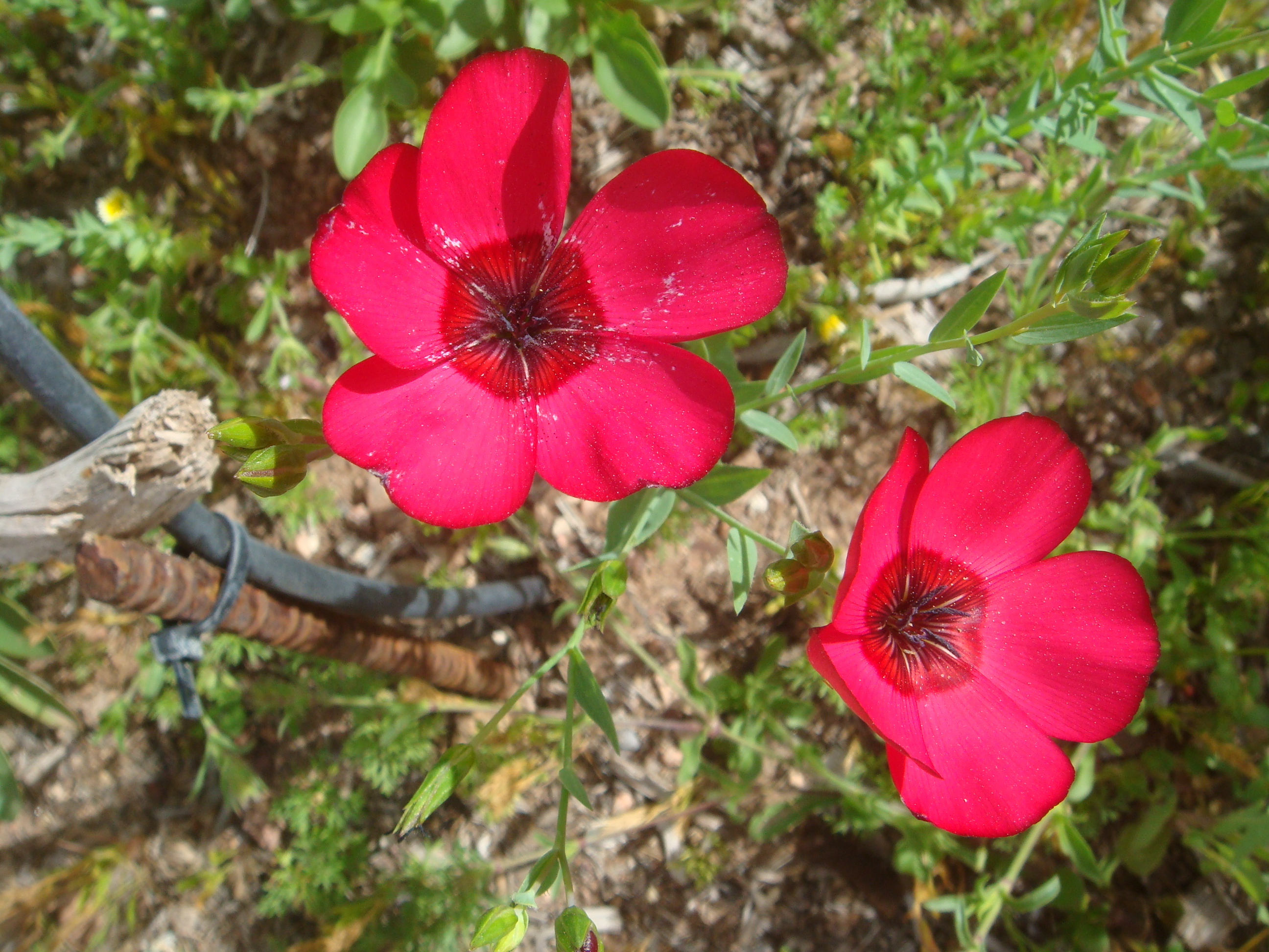 Linum grandiflorum, cultivated, Desert Botanical Garden, Phoenix, Arizona